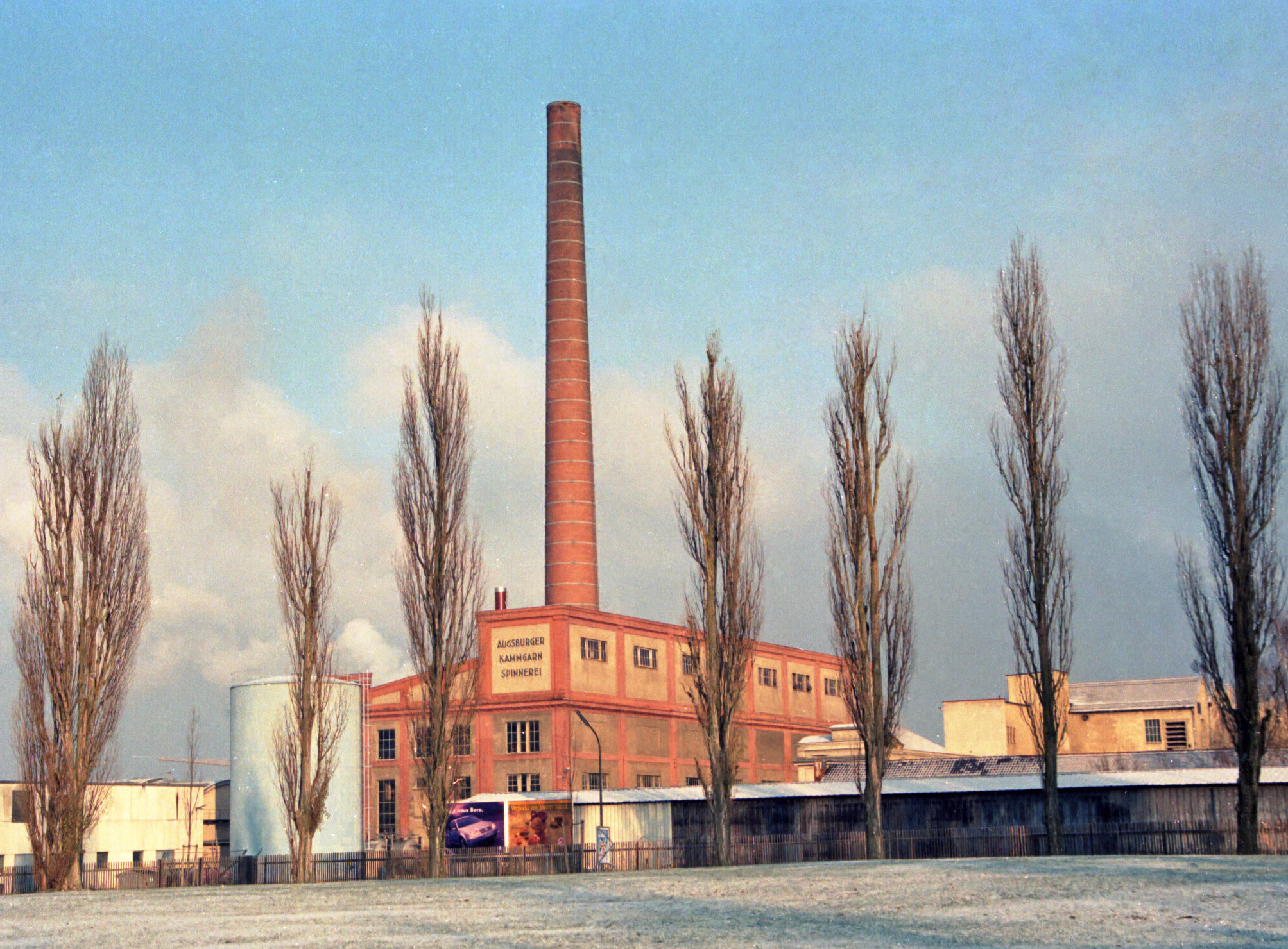 Augsburger Kammgarnspinnerei - neues Kesselhaus - aufgenommen von der Ambergerwiese